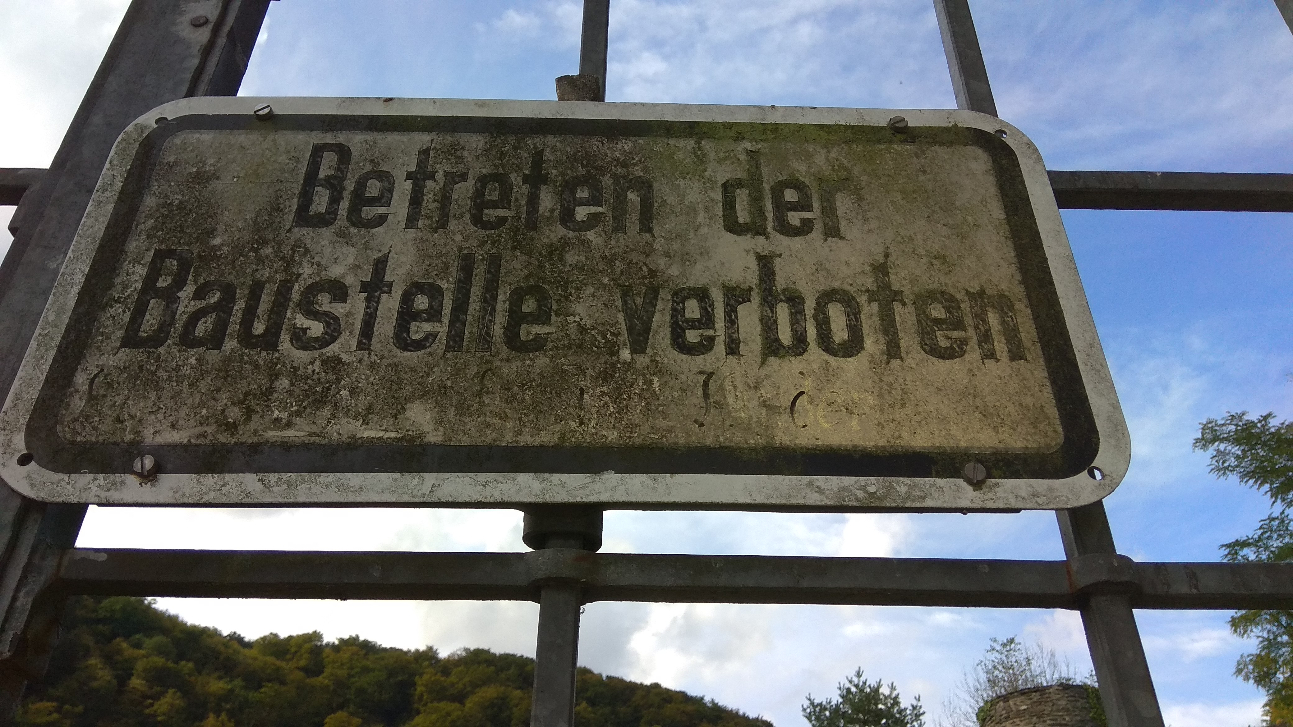 Vermoostes Schild an der Burg Altwied. Die Burg ist seit Jahren für die Öffentlichkeit gesperrt.